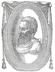 Gianfrancesco Straparola (Caravaggio 1480/1500 ca - dopo il 1557)